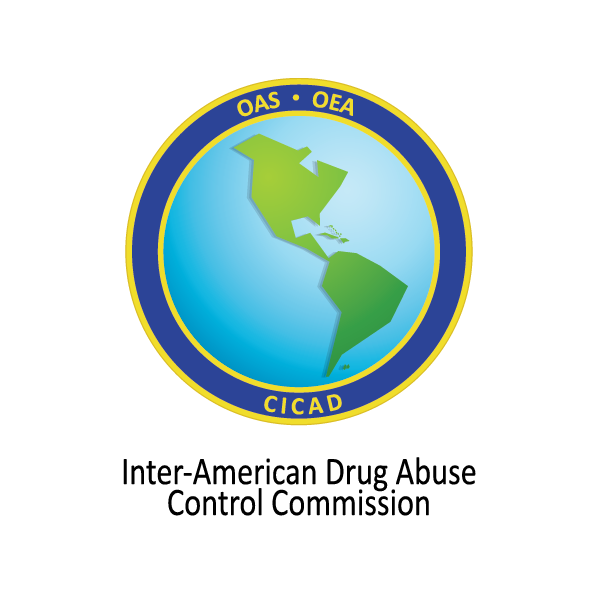 Logo CICAD english